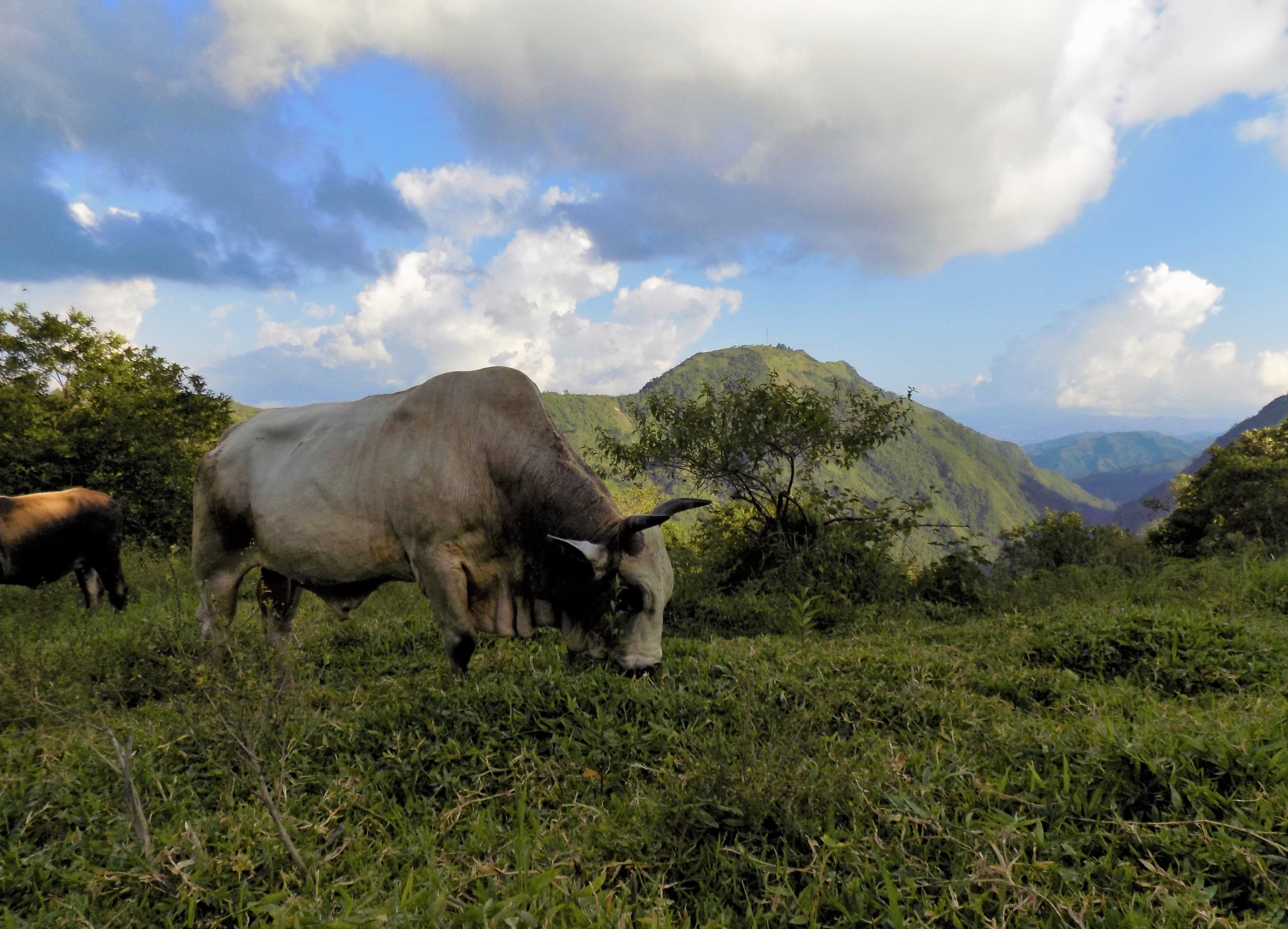 La calidad del suelo es propicia para el cultivo de pastos de ceba, en la actualidad la ganadería se continua desarrollando en gran medida de forma artesanal.